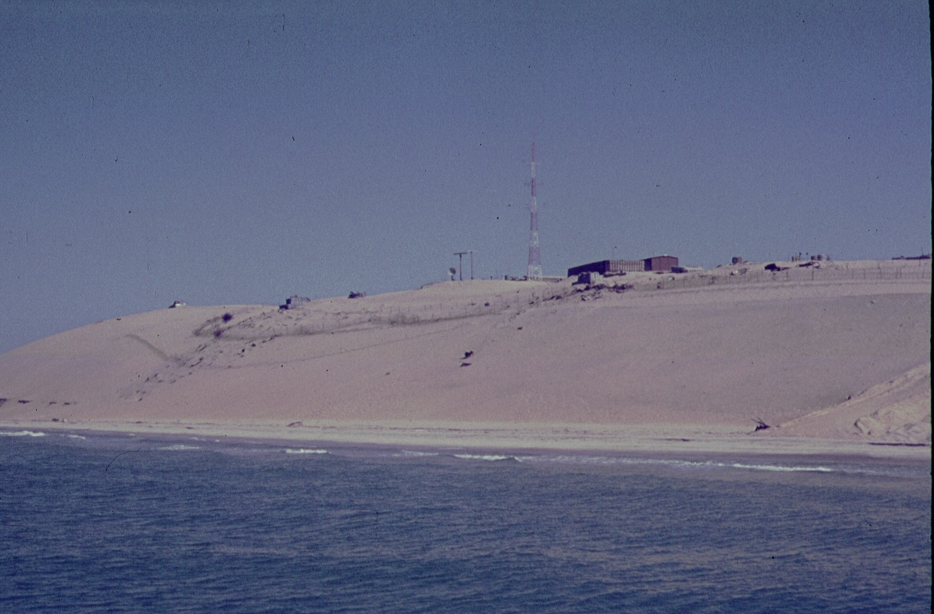 בסיס דפנה במבט מהים